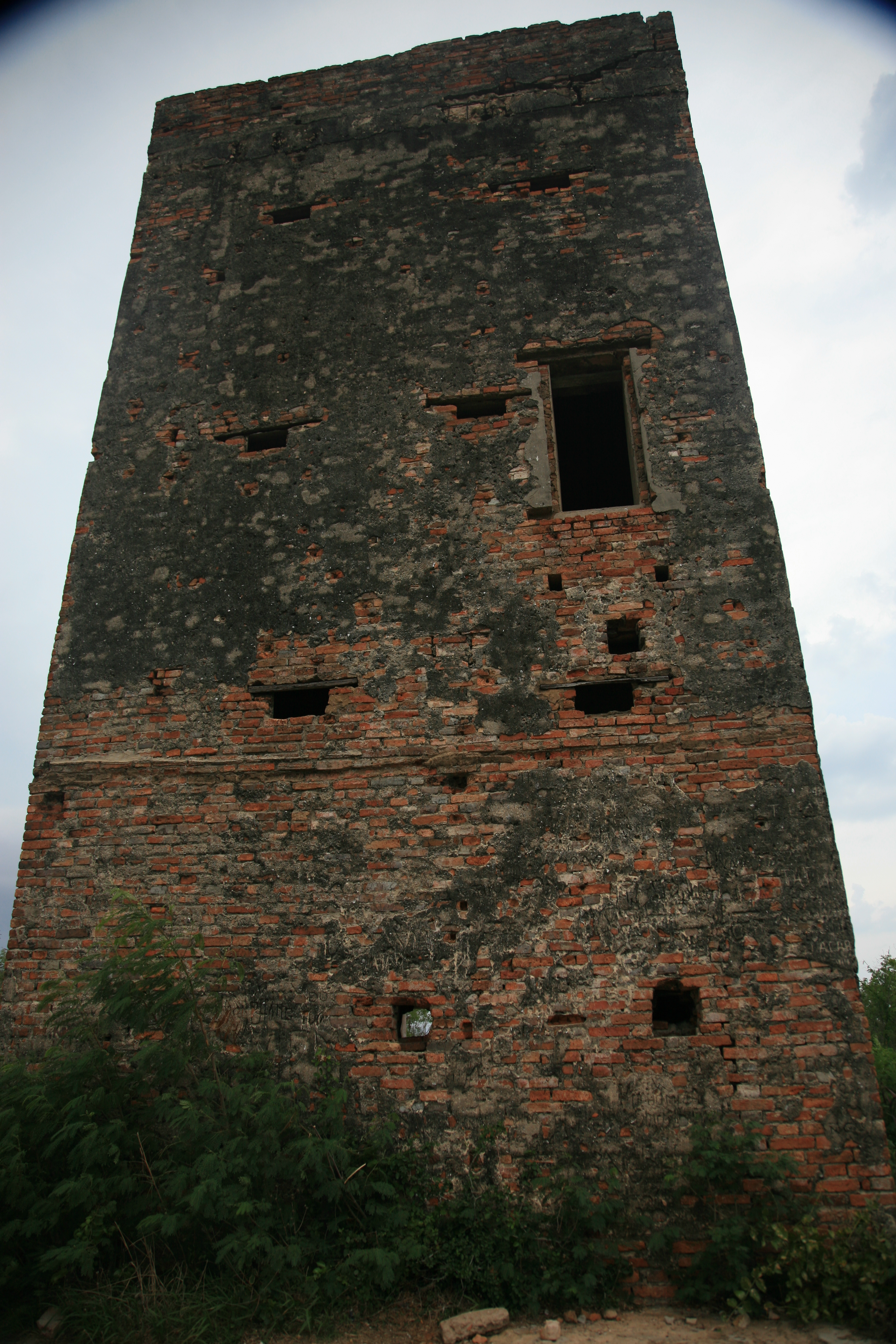 Lầu ông Hoàng